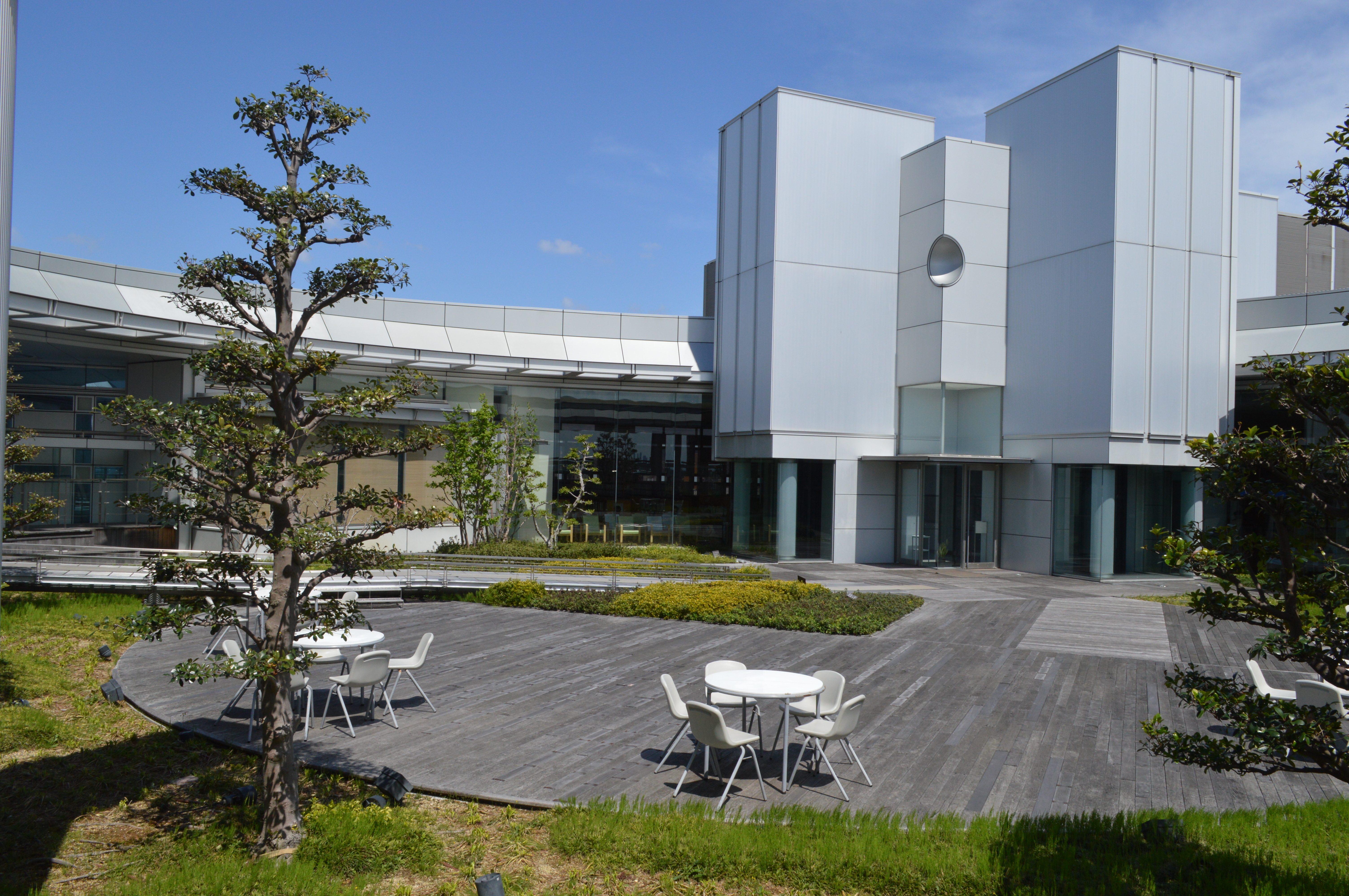 愛知県春日井市の文化フォーラム春日井。春日井市図書館から入る、屋外テラス。